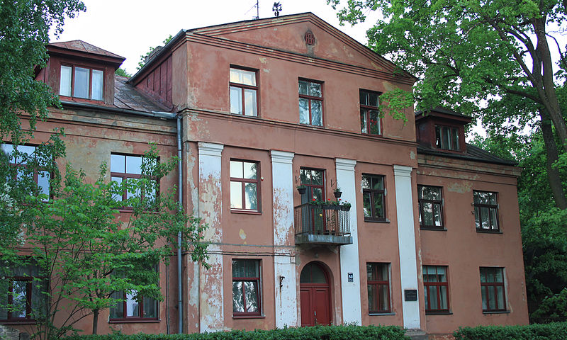 Kuldigas iela 50, Riga (Lettonie)